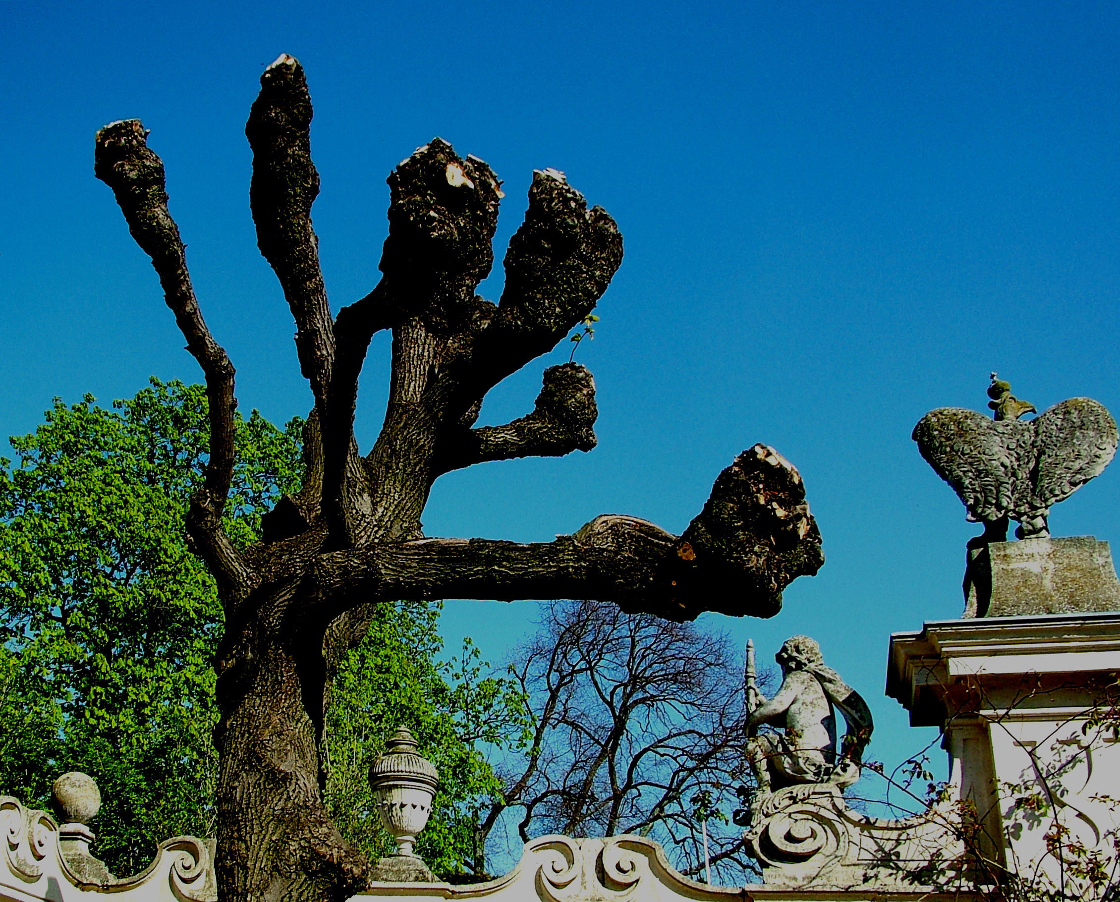 A halbturni kastély udvari homlokzatrészlete (Ausztria)